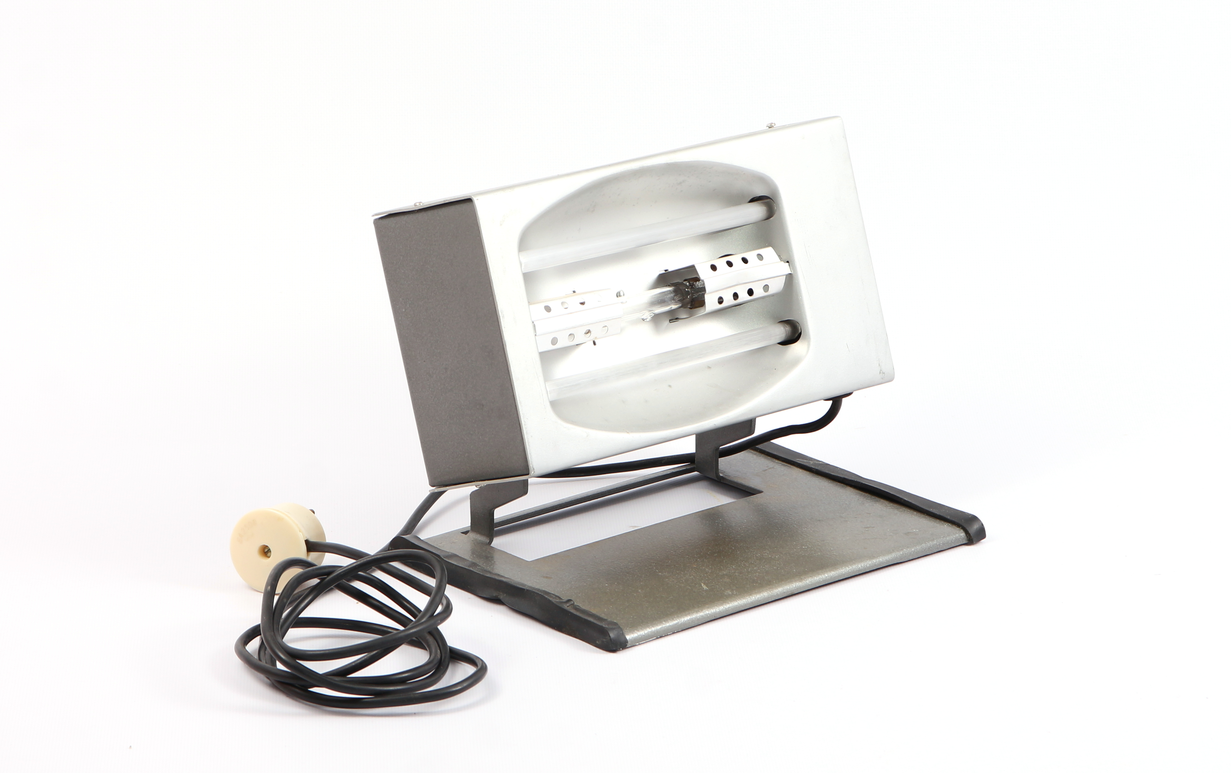 Советская кварцевая лампа бытового назначения УФО-Б, с ртутной дуговой лампой и таймером отключения (до 15 мин). комплектовалась защитными очками, предназначалась для дезинфекции помещений и облучения кожи в профилактических целях.